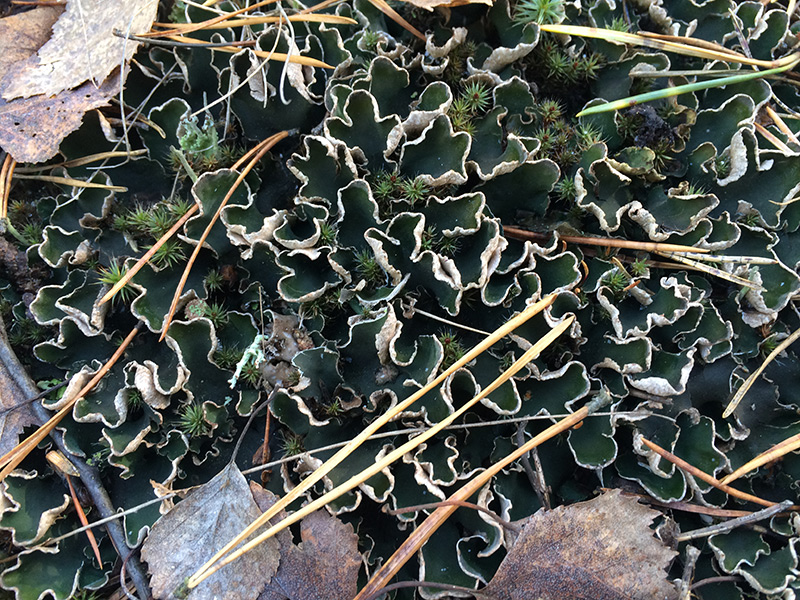 Peltigera malacea